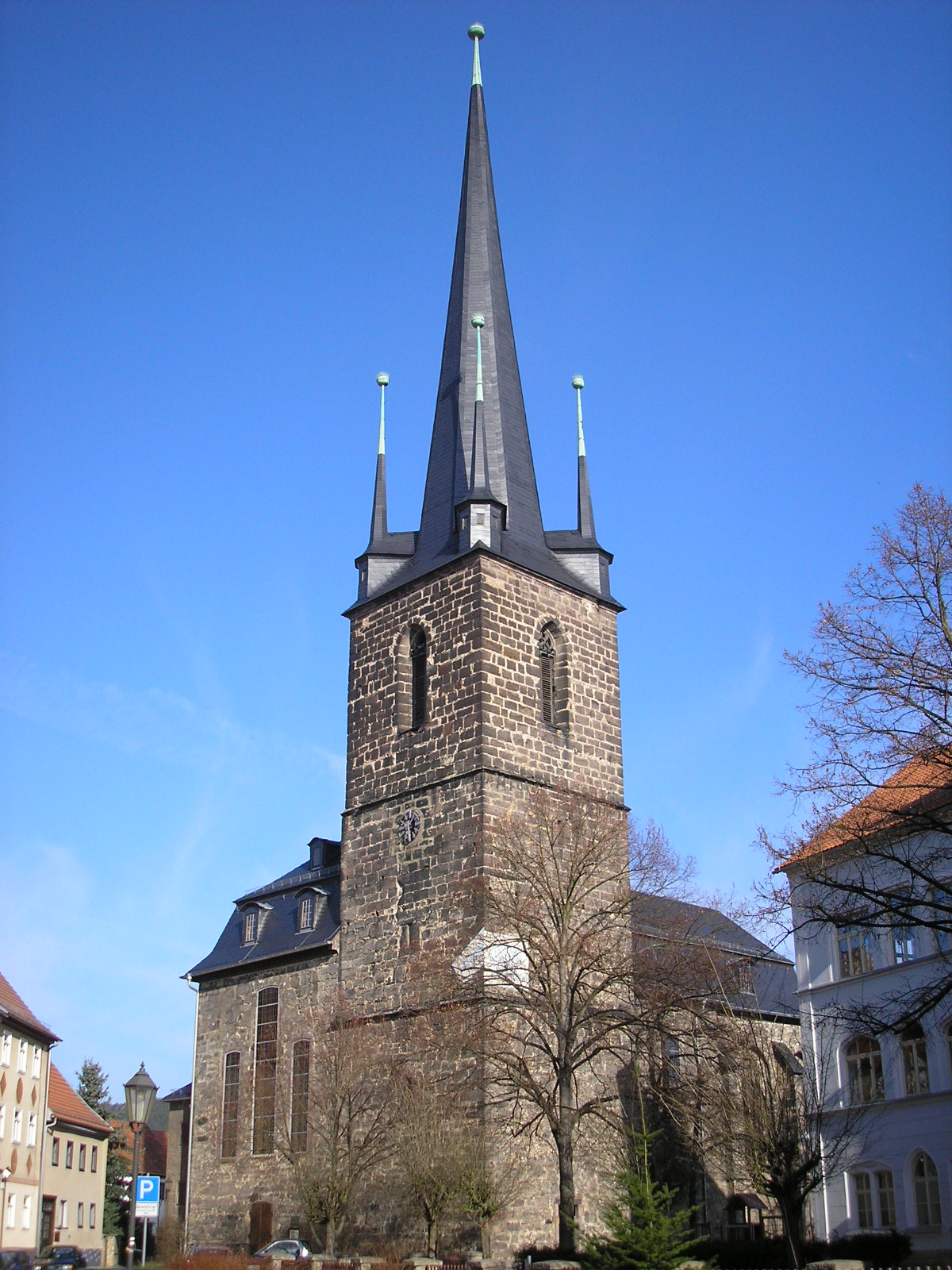 Die Stadtkirche von Kahla (Thüringen).